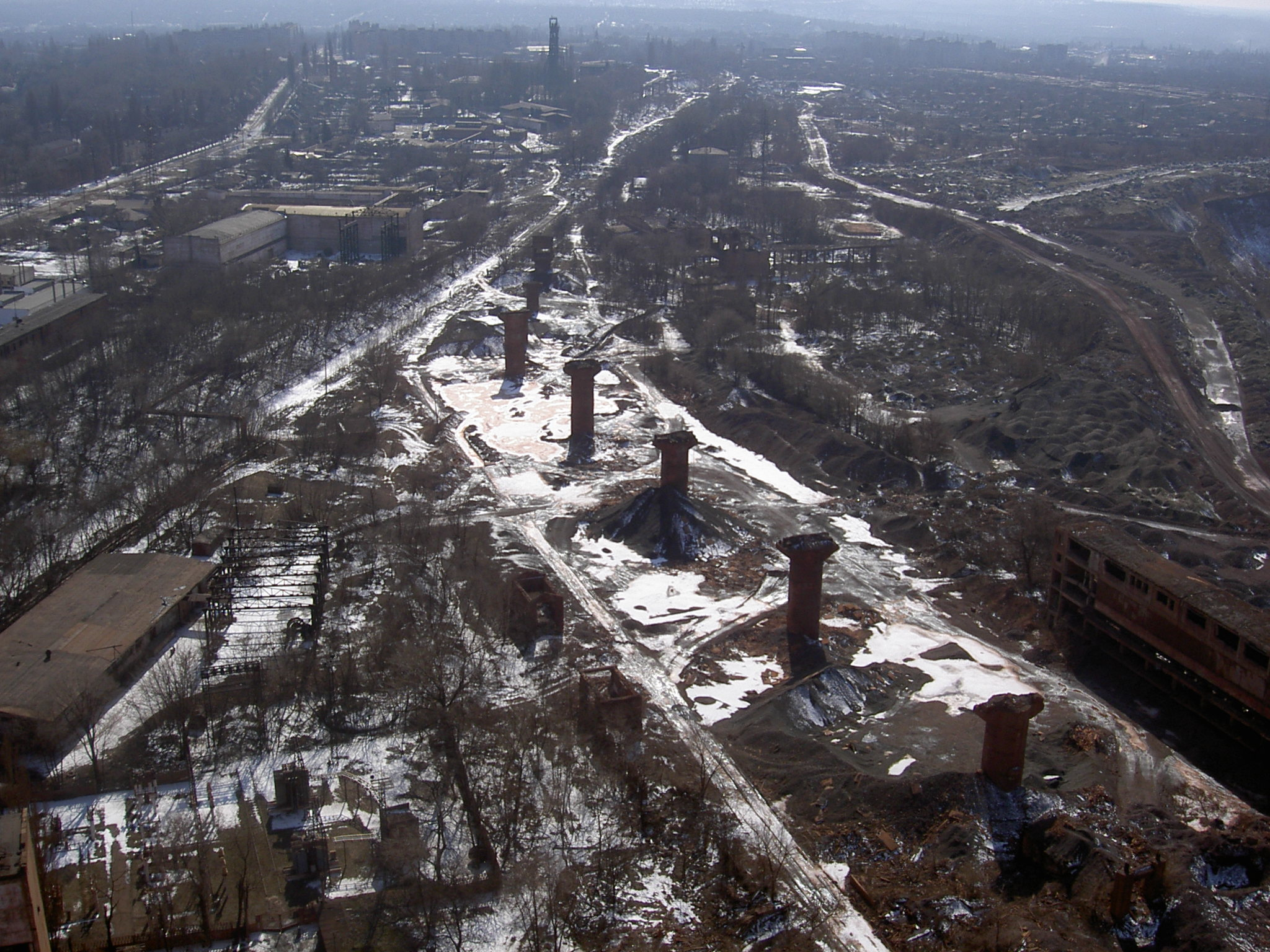 Вид с копра шахты "Гигант" (юг)